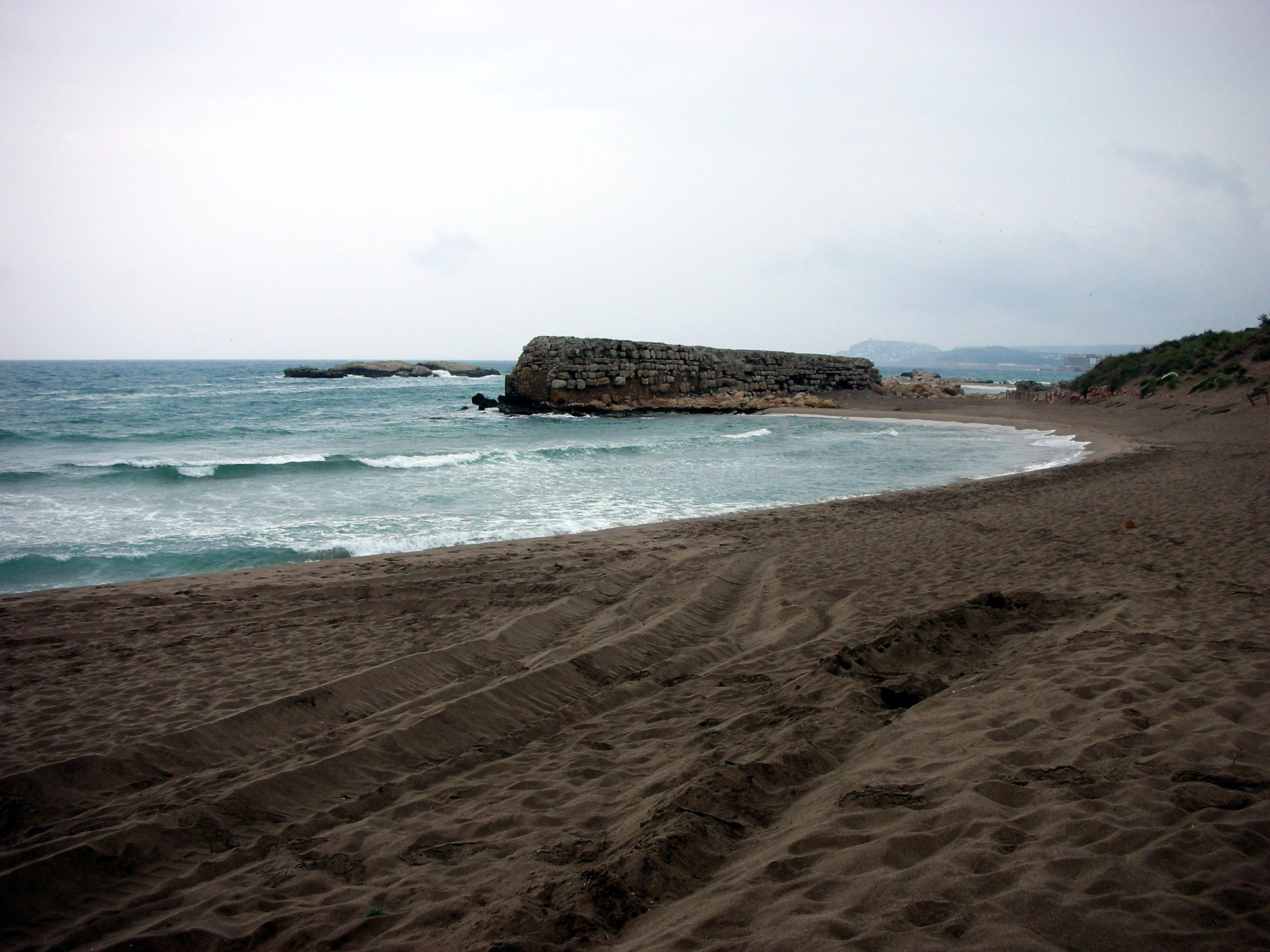 Mole of antique port at Empuries (Spain)